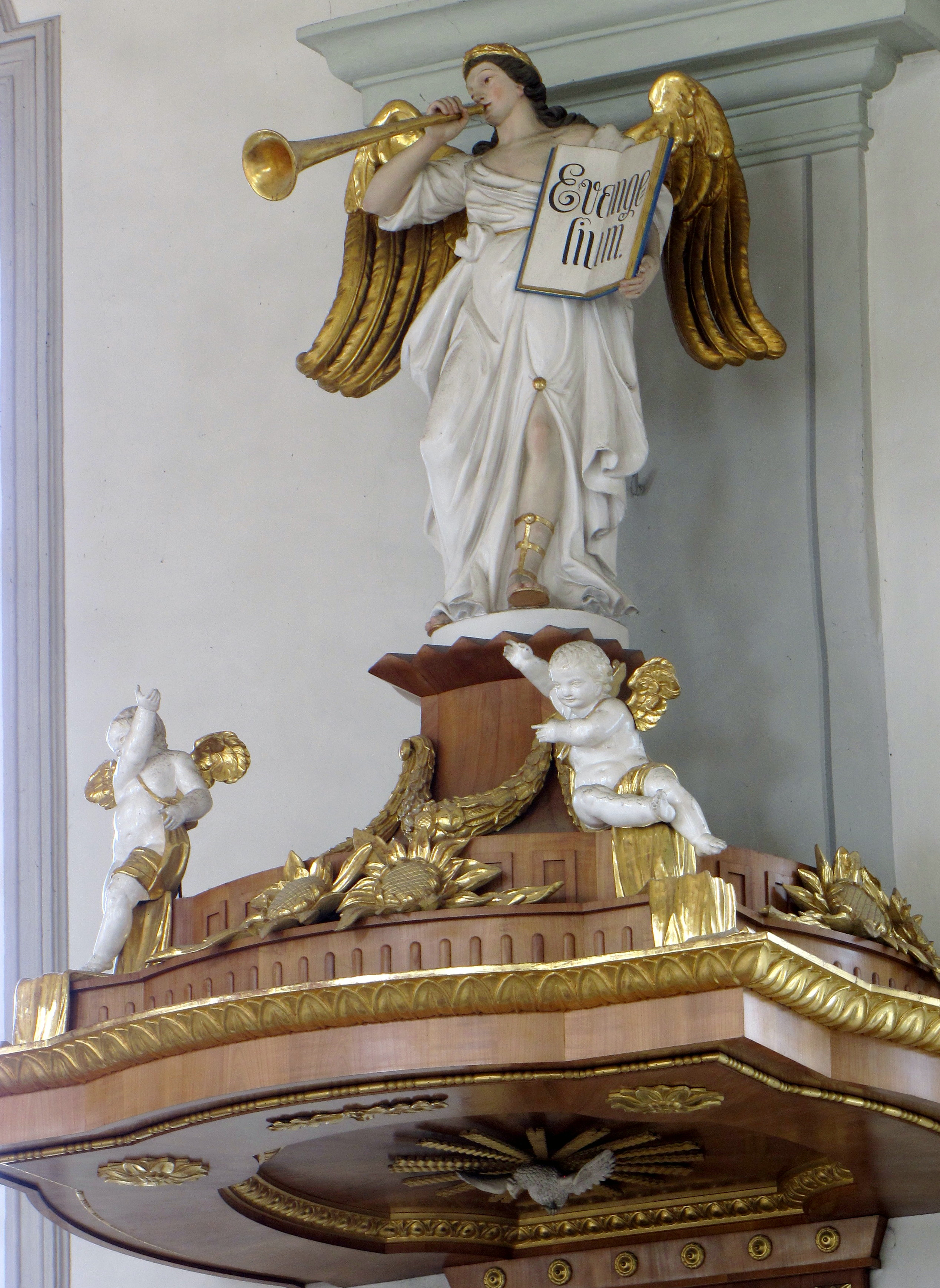 Posaunenengel als Kanzelbekrönung von Johann Richard Eberhart, 1797, in der Kirche von Weiler